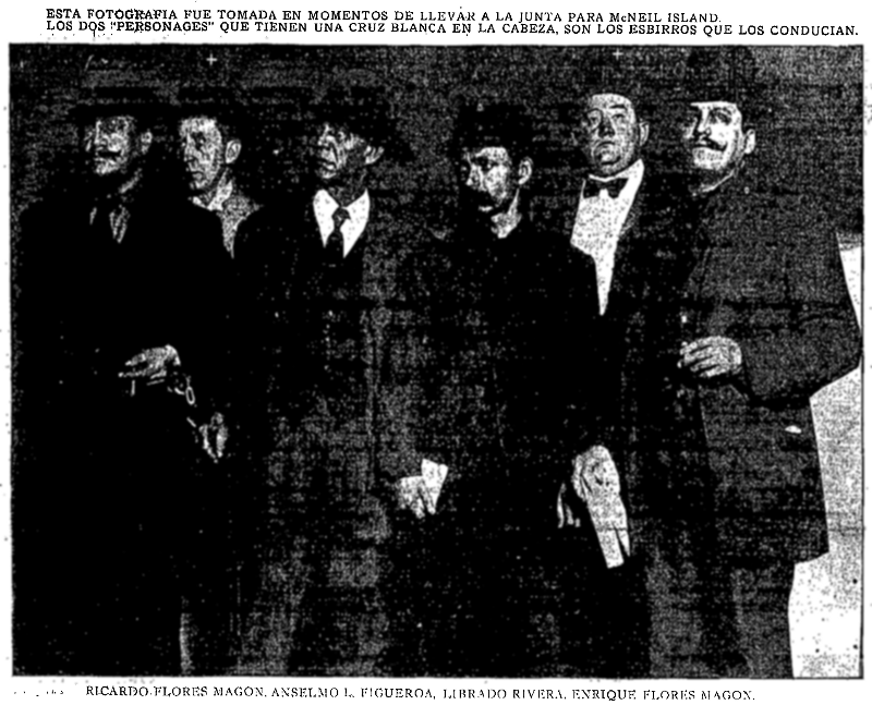 Junta Organizadora del PLM (Ricardo Flores Magón, Anselmo L. Figueroa, Librado Rivera y Enrique Flores Magón) conducidos a la prisión de McNeil Island.